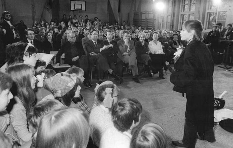 ADN-ZB Senft 19.12.84 Bez. Potsdam: Mit einer festlichen Veranstaltung zum 90. Geburtstag Paul Dessaus gedachten die Lehrer und Schüler der nach ihm benannten Zeuthener Oberschule des bedeutenden Komponisten. An der Feierstunde nahmen Margot Honecker (1. Reihe 2.v.r.), Günter Jahn, (3.v.r.), Prof. Manfred Wekwerth (6.v.r.), die Lebensgefährtin Paul Dessaus, Ruth Berghaus (r) sowie weitere Persönlichkeiten teil. Der Chor der Schule, dem zuvor der Name des Komponisten verliehen wurde, führte das kleine Singstück für Kinder "Rummelplatz" von Paul Dessau auf.